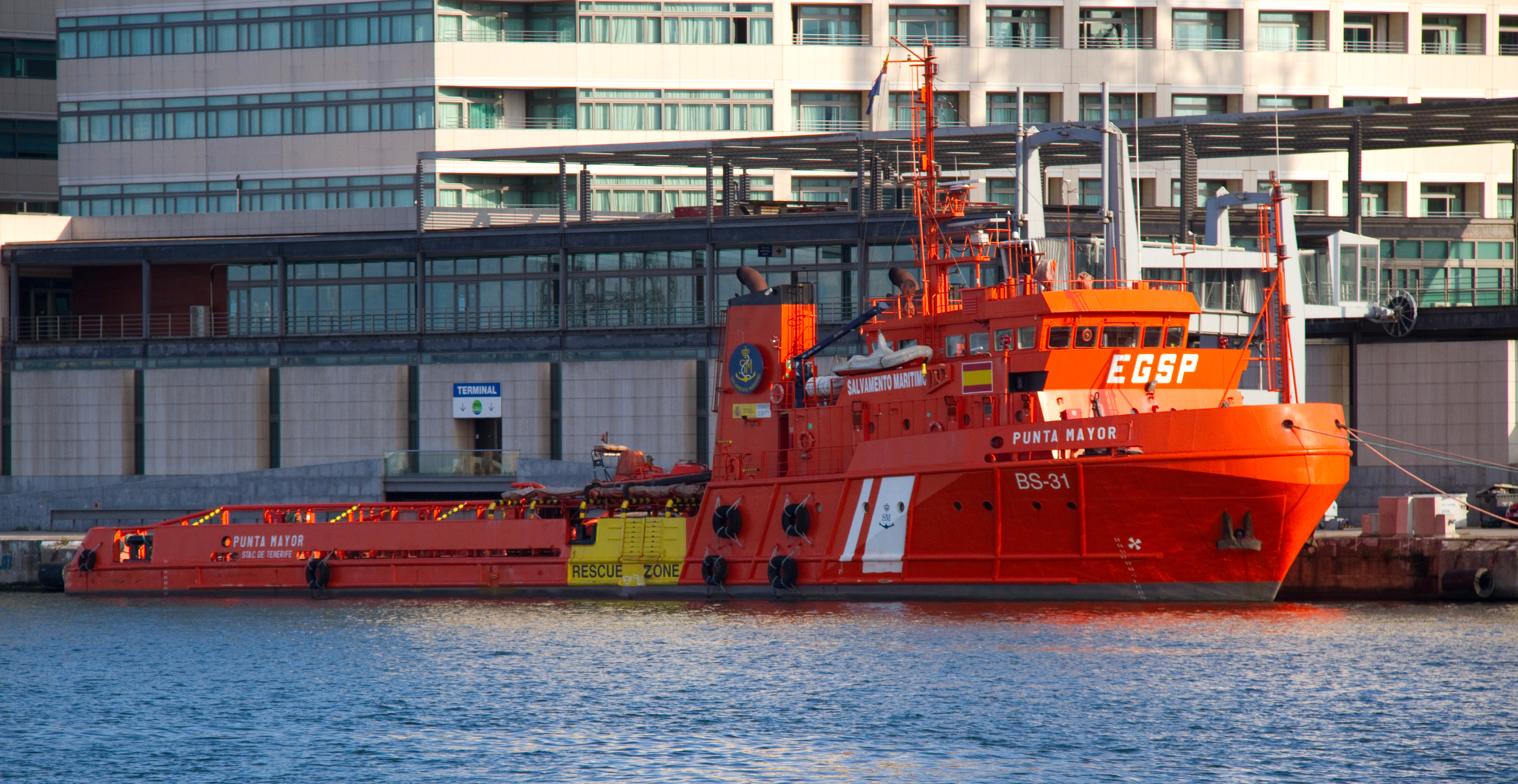 Punta Mayor